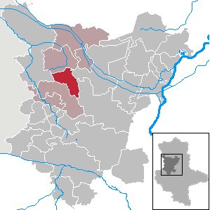 Altenhausen in Saxony-Anhalt (Country) - District (Landkreis) Börde